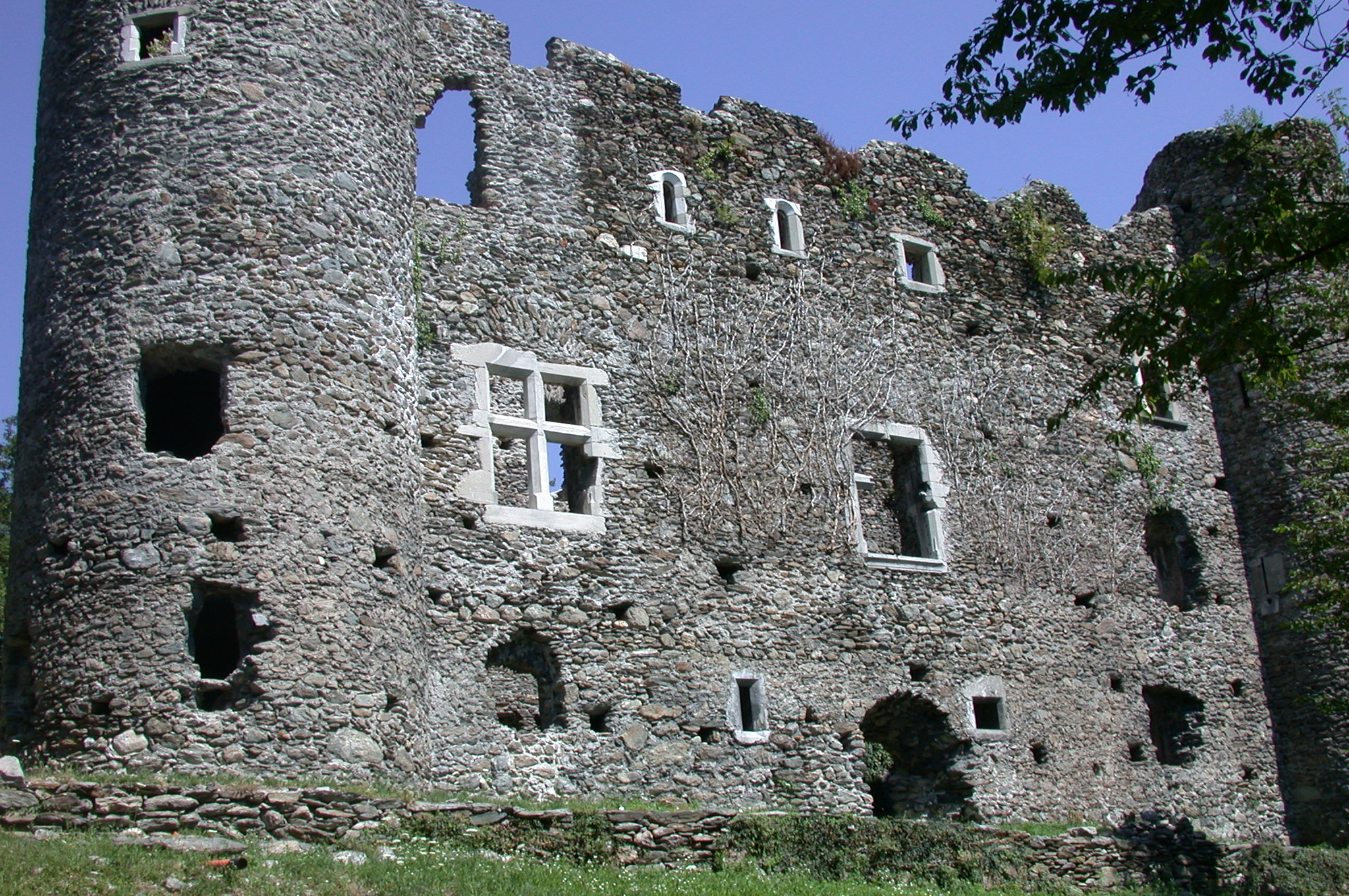 château médiéval